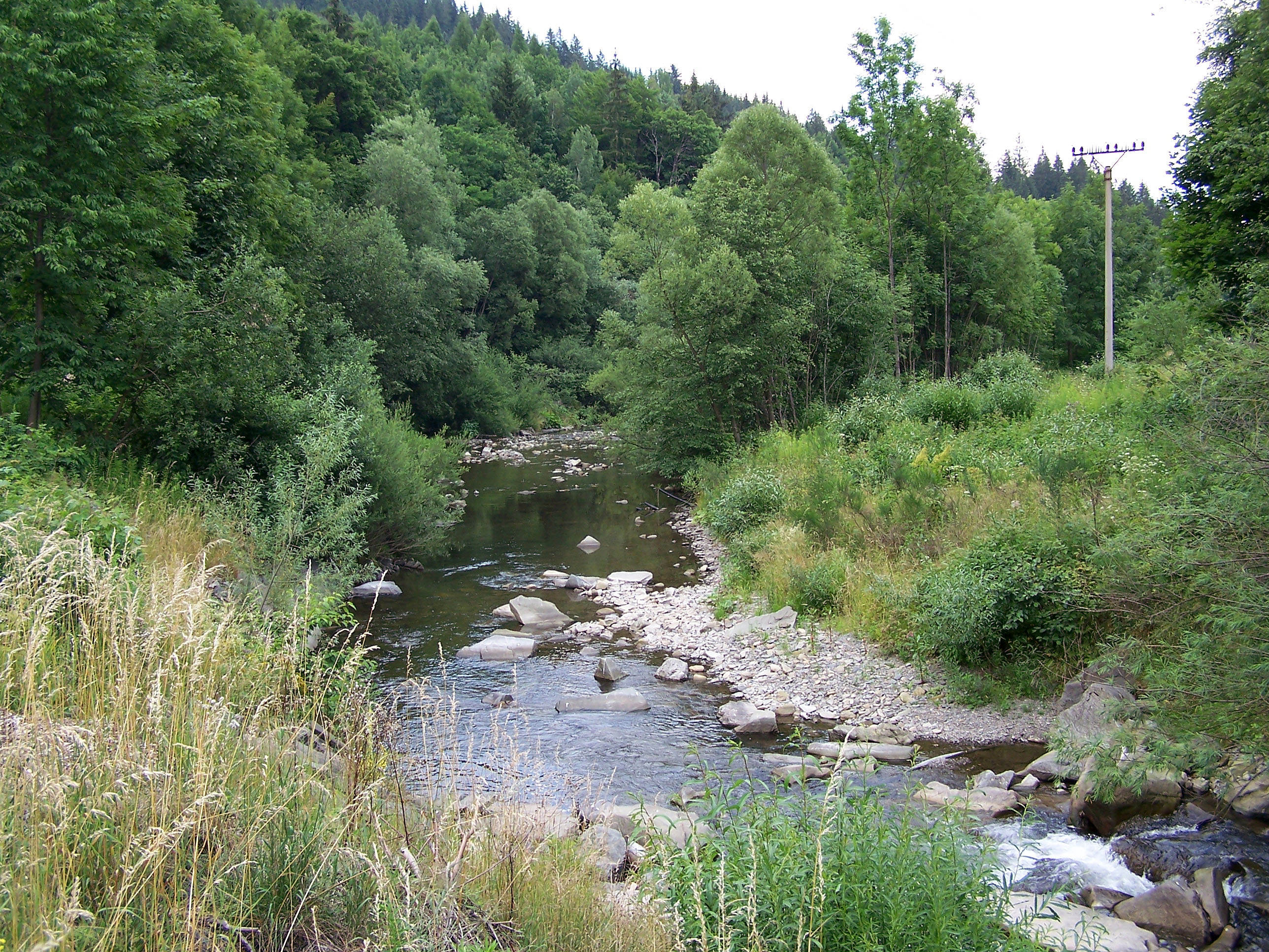 Lomná (Łomna) River in Dolní Lomná (Łomna Dolna), Beskids, Czech Republic